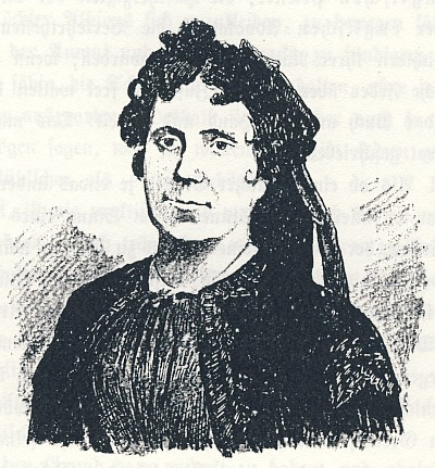 Portrait der deutschen Schriftstellerin Luise Aston.